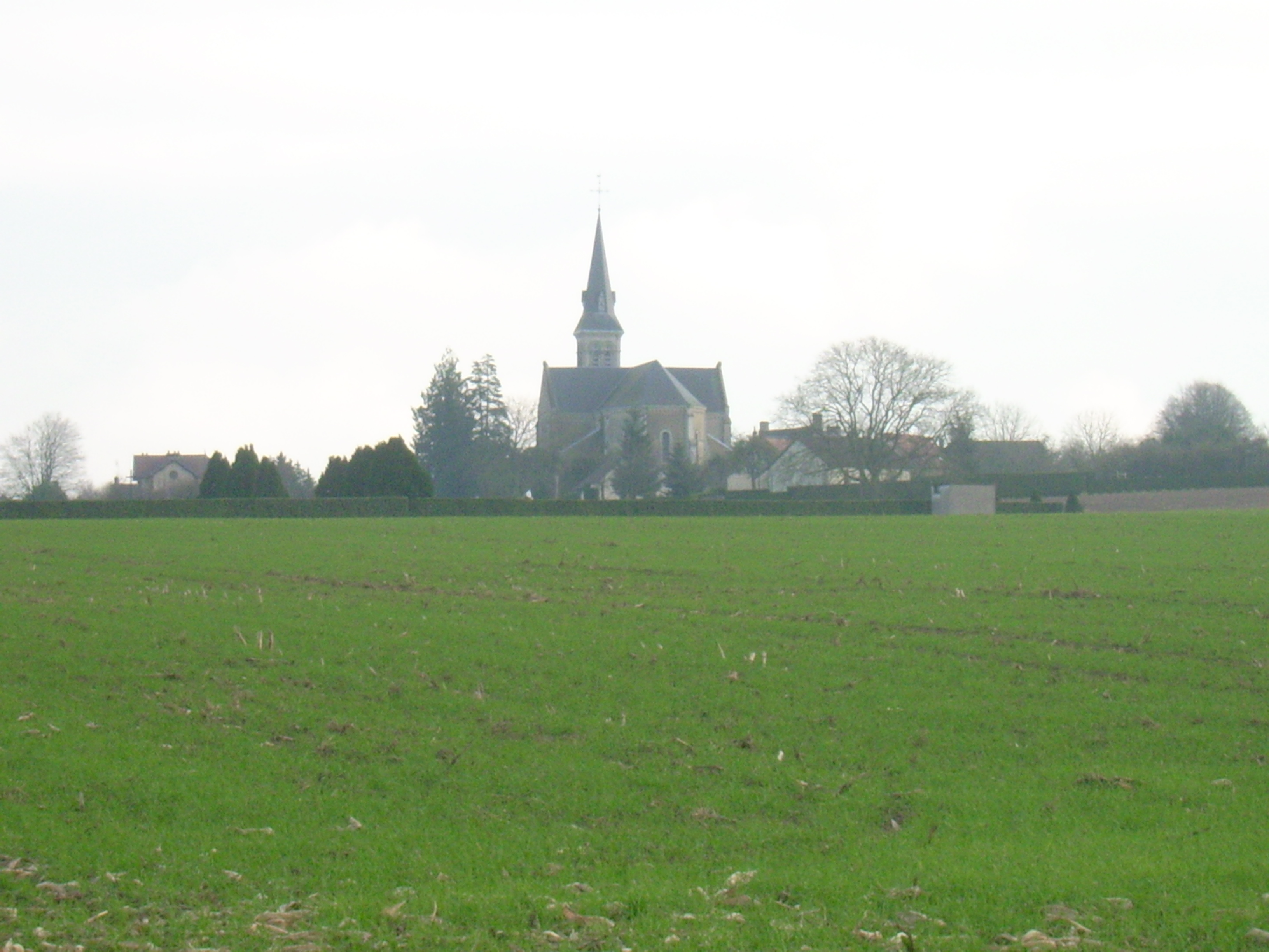 vue d'ensemble